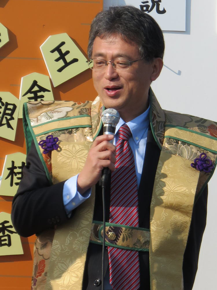 将棋棋士の脇謙二（平成２９年１１月、姫路市で行われた人間将棋にて）